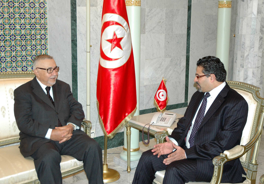 « La Tunisie est dotée aujourd'hui de tous les mécanismes nécessaires à même de lui permettre de régler tous les problèmes à caractère politique, économique et social », a également affirmé M. Radi, à l'issue de l'entretien qu'il a eu, mardi, à Tunis, avec le ministre des Affaires étrangères, Dr Rafik Abdessalem.